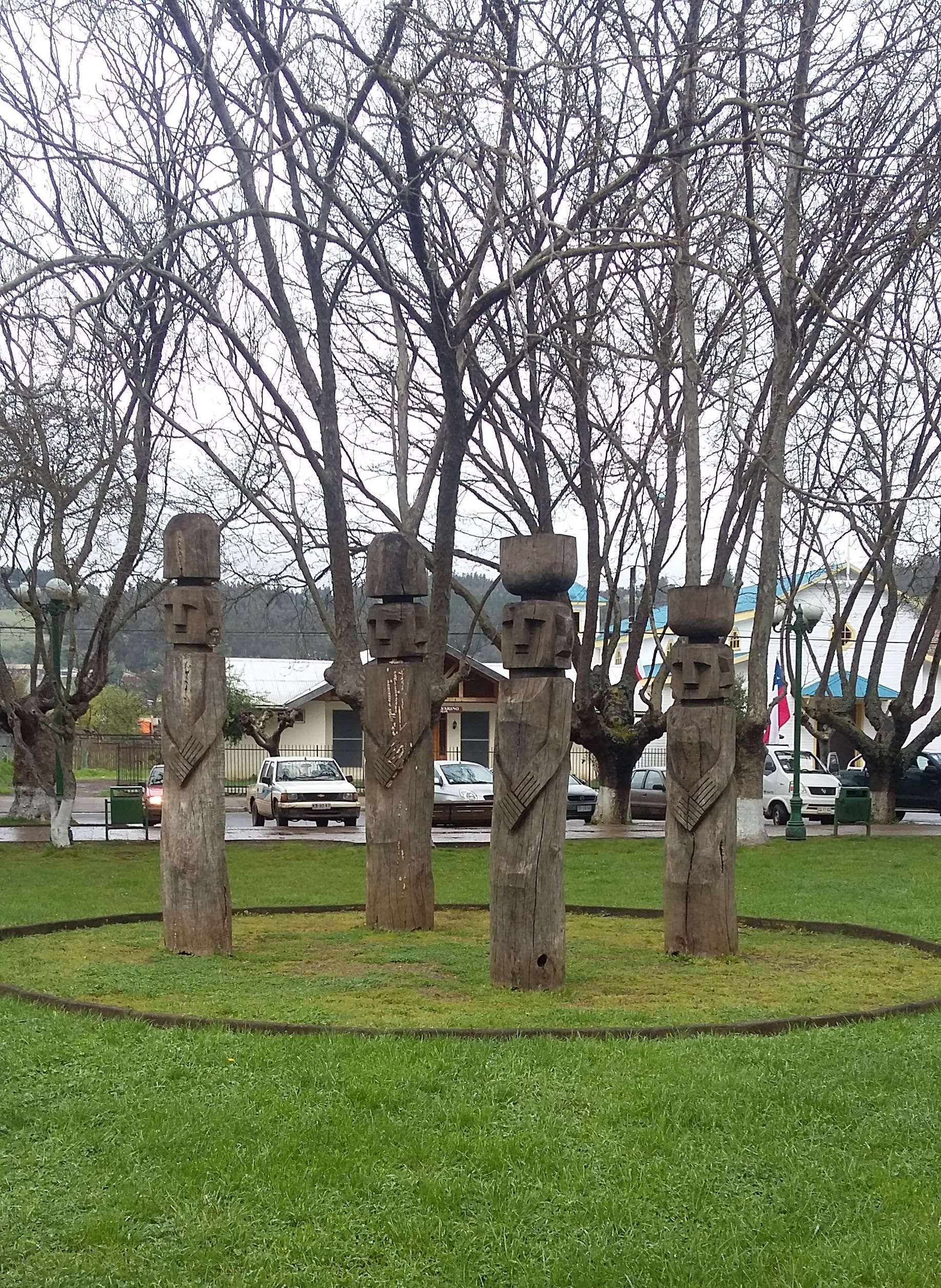 Chemamlülls de la Plaza de Armas de Galvarino.